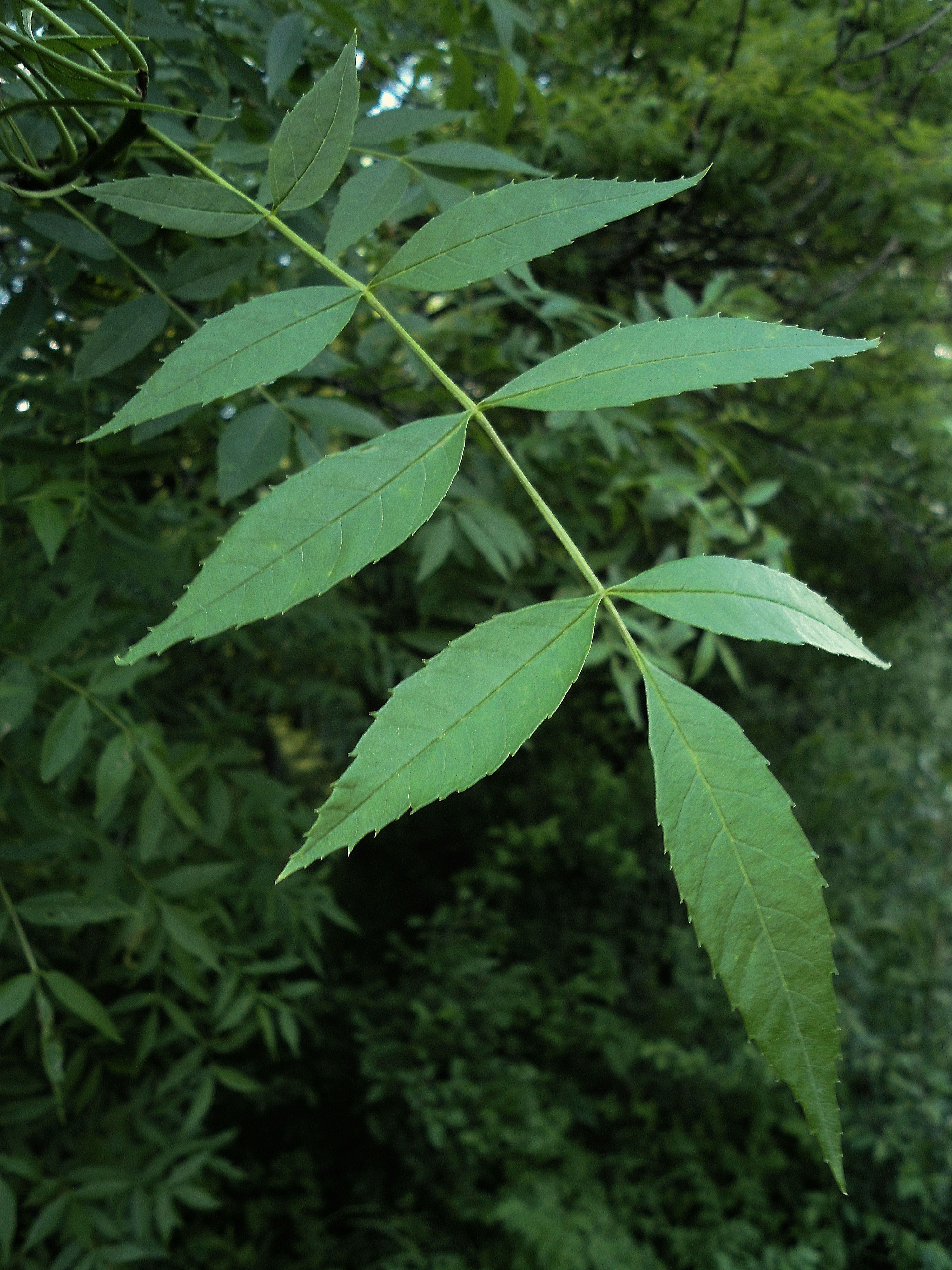 Тези девет листчета съставляват само един - т.нар. сложен нечифтоперест лист. При ясена обикновено са нечетен брой (3, 5, 7, 9, 11 и т.н.) - с едно на върха, останалите - симетрично разположени от двете страни на листната дръжка.